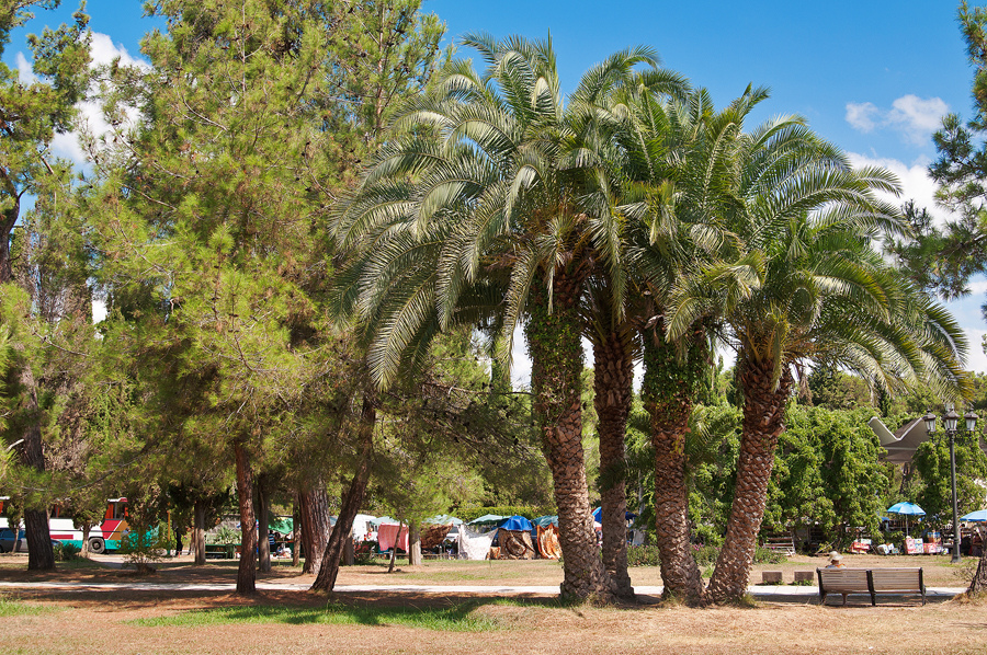 Пицунда в августе 2010